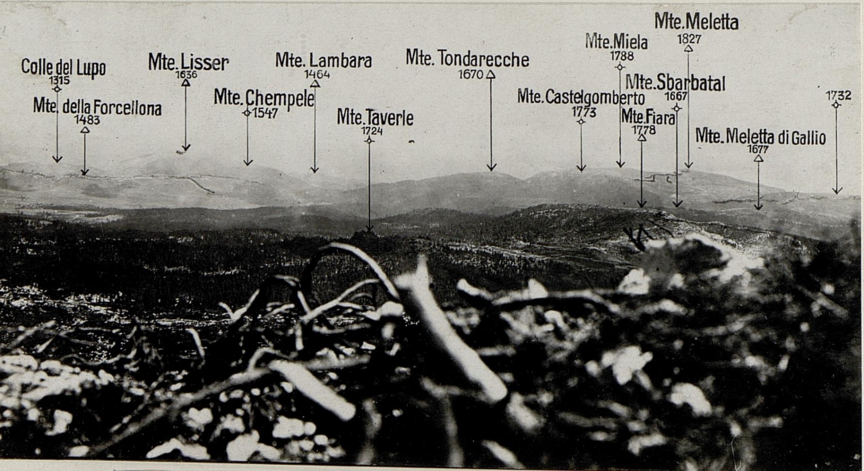 Panorama: Cima Undici bis Mte.Meletta. Standpunkt: Corno di Campo Bianco. (2. Teilbild zu WK1_ALB082_24354a)